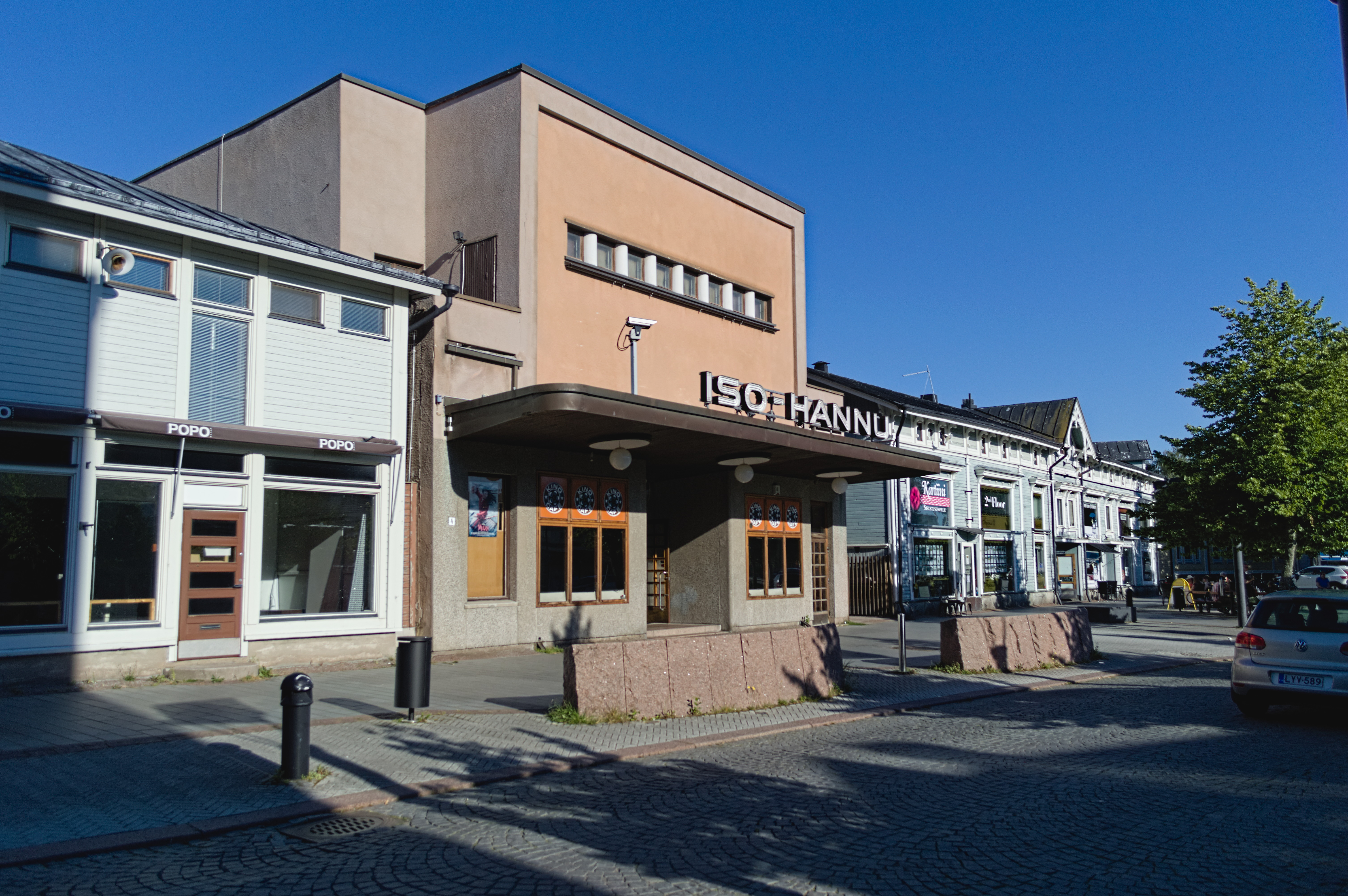 Elokuvateatteri Iso-Hannu